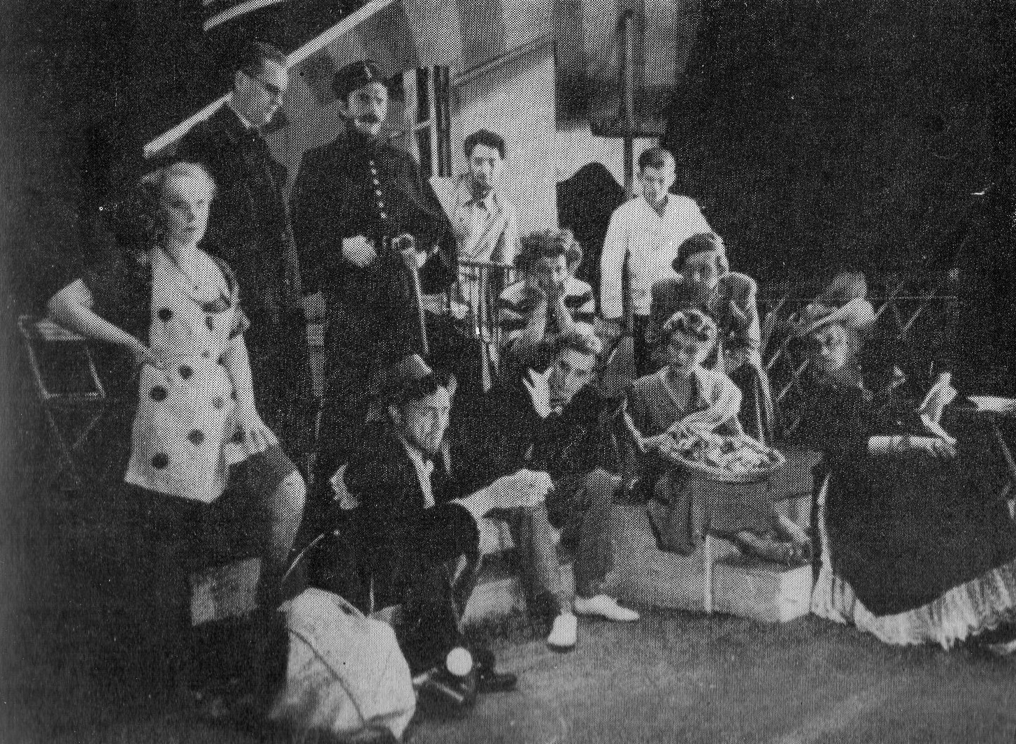 Wariatka z Chaillot na deskach Teatru TUR, Kraków - 1947r.